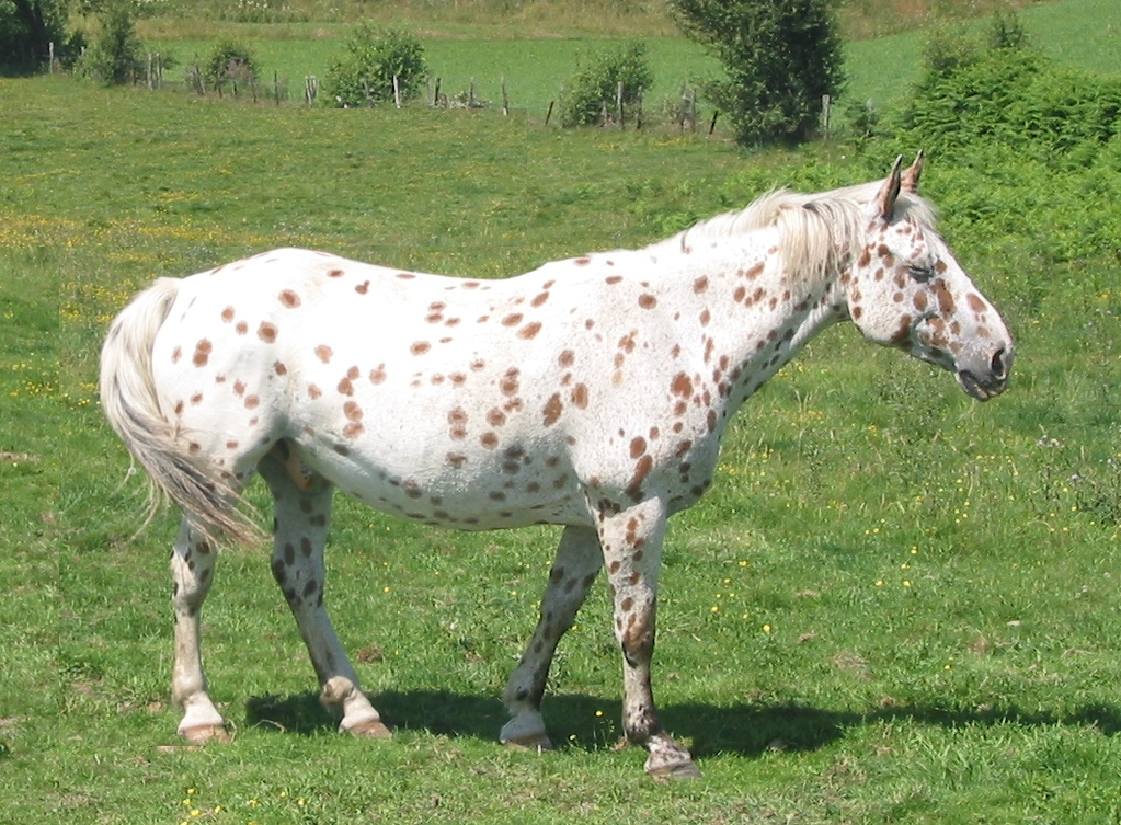 'Appaloosa (de)